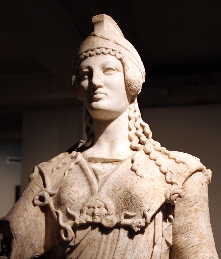 Statue d'Athéna vêtue de l'égide ornée du gorgoneion. Copie archaïsante en marbre blanc (Ier-IIe siècle) d'un original grec du Ve siècle av. J.-C.